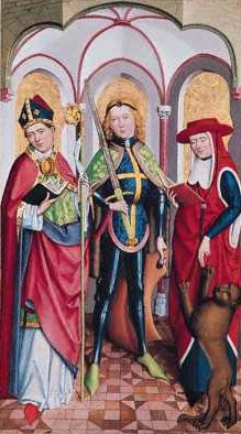 Altarbild mit Exuperius (Mitte), Ambrosius (links) und Hieronymus, um 1465 - 1490, National Gallery in London .